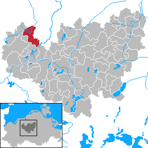 Klein Belitz in Mecklenburg-Vorpommern - District Güstrow